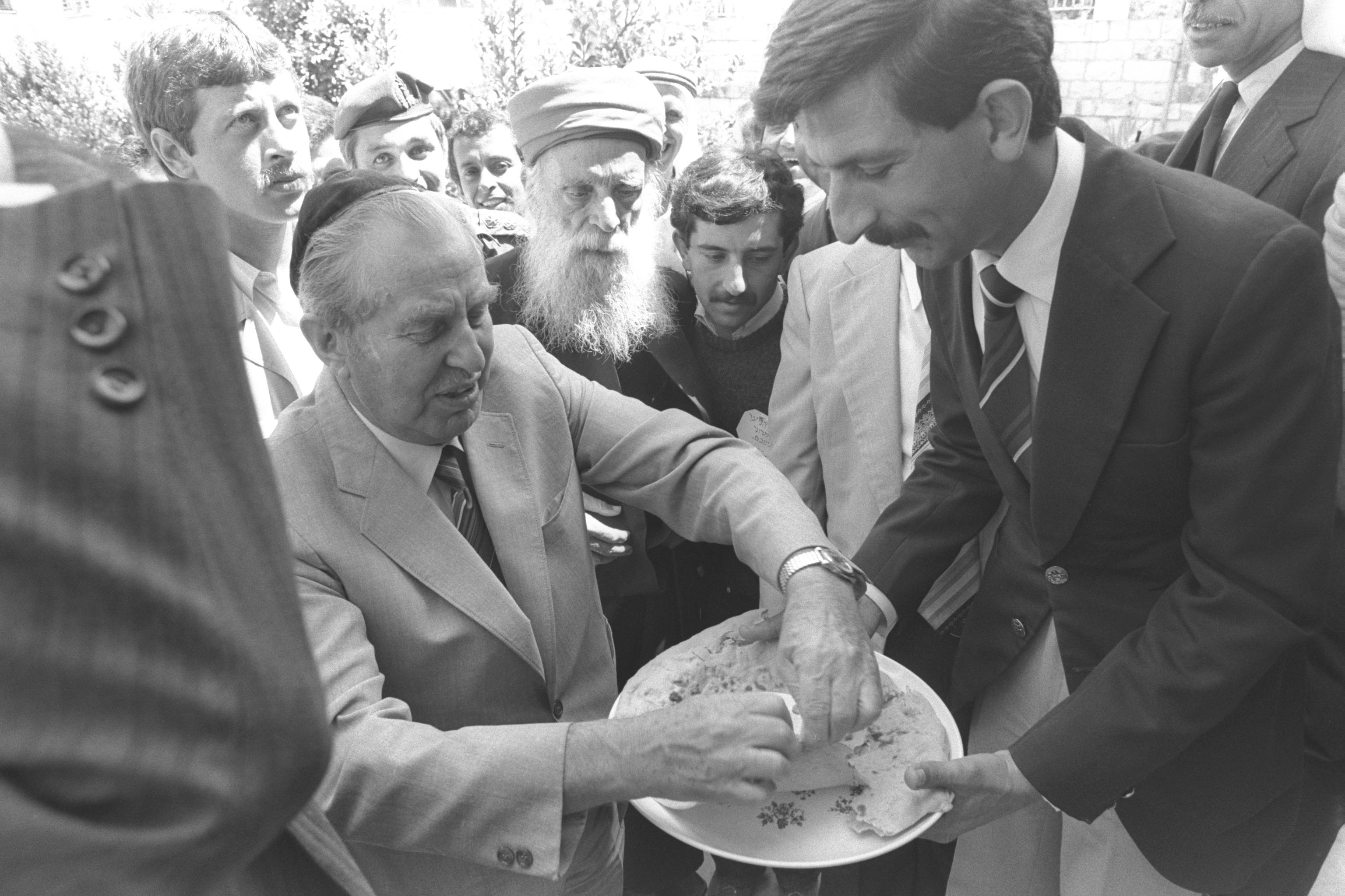 President Chaim Herzog is welcomed with bread and salt by a member of the Samaritan community on behalf of the High Priest Pinhas Ben Mazliah (center) in Nablus. קבלת פנים מסורתית לחם ומלח לנשיא המדינה חיים הרצוג בביקורו אצל הקהילה השומרונית, בראשות הכומר פינחס בן מצליח, בשכם. Photo: HERMAN CHANANIA, 05/01/1984